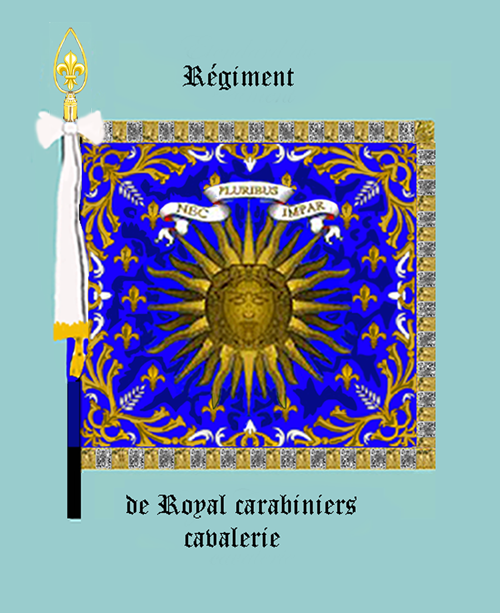 Standarte des Kavallerieregiments „Royal Carabiniers“ Königreich Frankreich